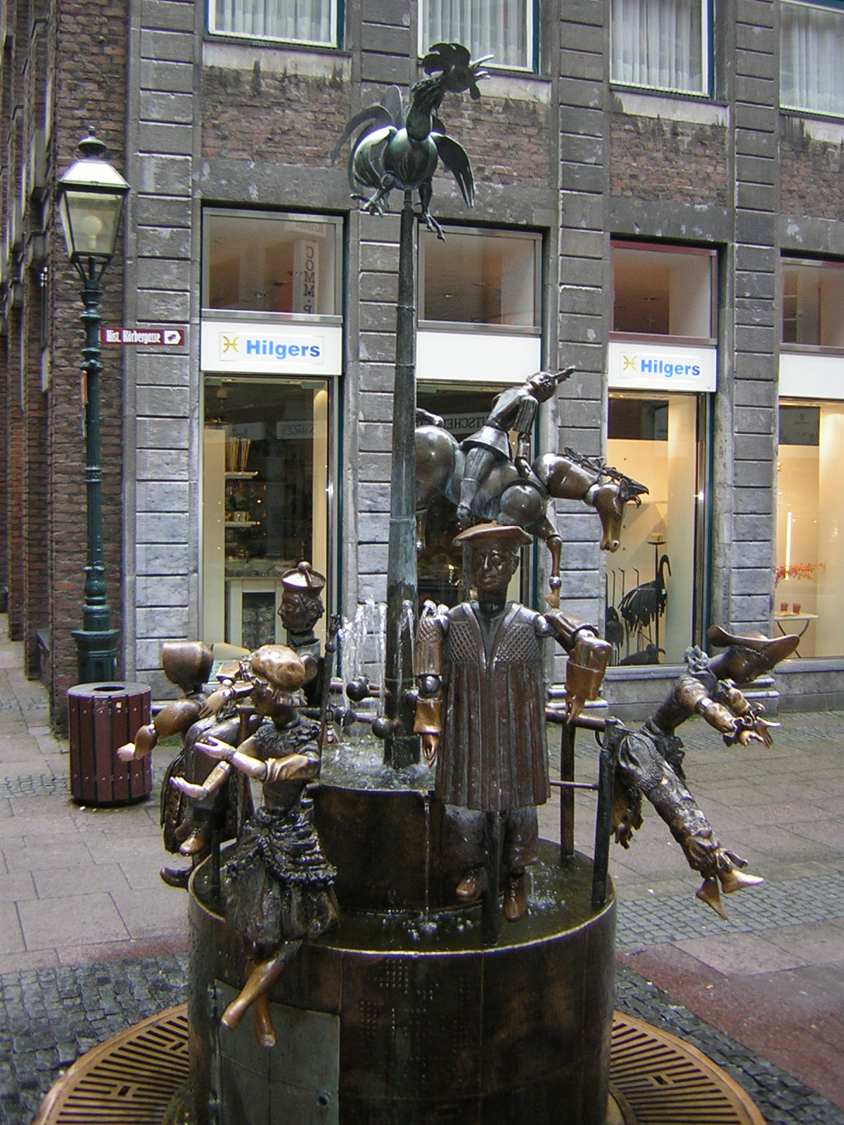 Beschreibung: Puppenbrunnen in Aachen Fotograf: Trexer Aufgenommen: 2005 mit Nikon Coolpix 2200